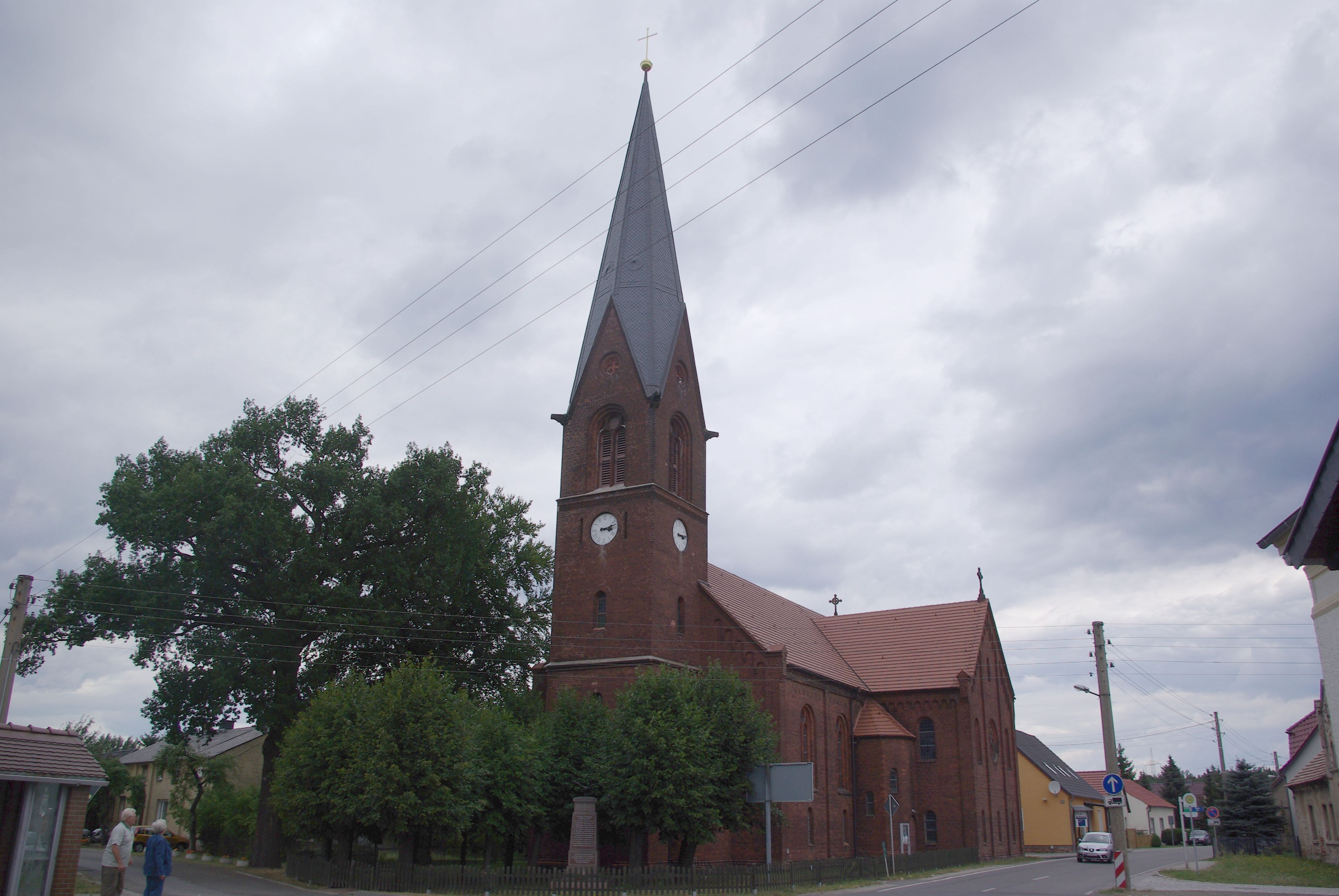 Schmogrow-Fehrow in Brandenung. Die Kirche im Ortsteil Fehrow steht unter Denkmalschutz.